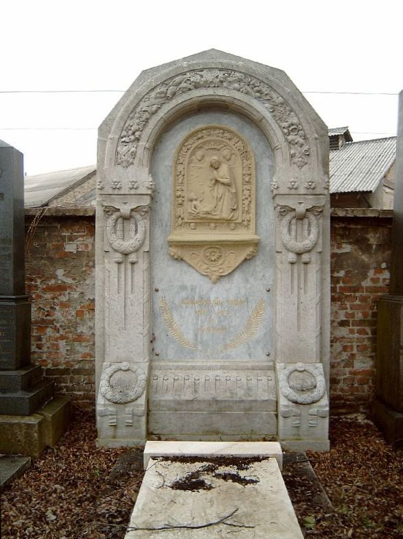 Jendrassik Jenő (Kapnikbánya, 1824. november 18. – Budapest, 1891. március 3.) fiziológus, egyetemi tanár és fia, Jendrassik Ernő (Kolozsvár, 1858. június 7. – Budapest, 1921. december 21.) bel- és ideggyógyász, egyetemi tanár sírja Budapesten. Kerepesi temető: J. 268.